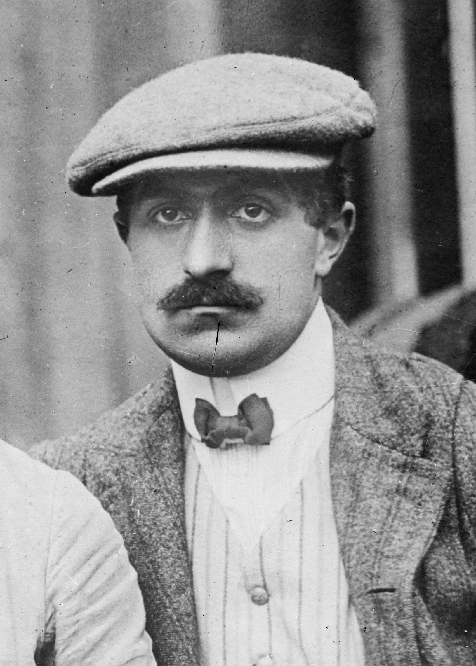 Charles Voisin (for Gabriel Voisin see Image:GabrielVoisin.jpg).